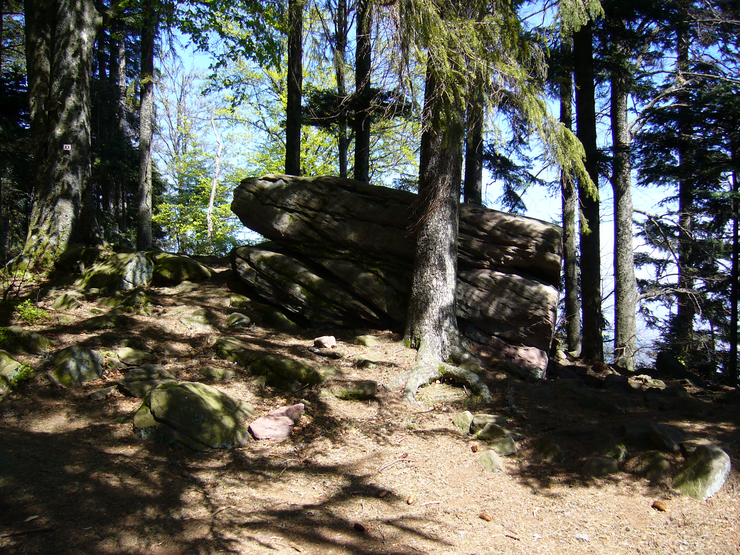 Taennchel 488.JPG